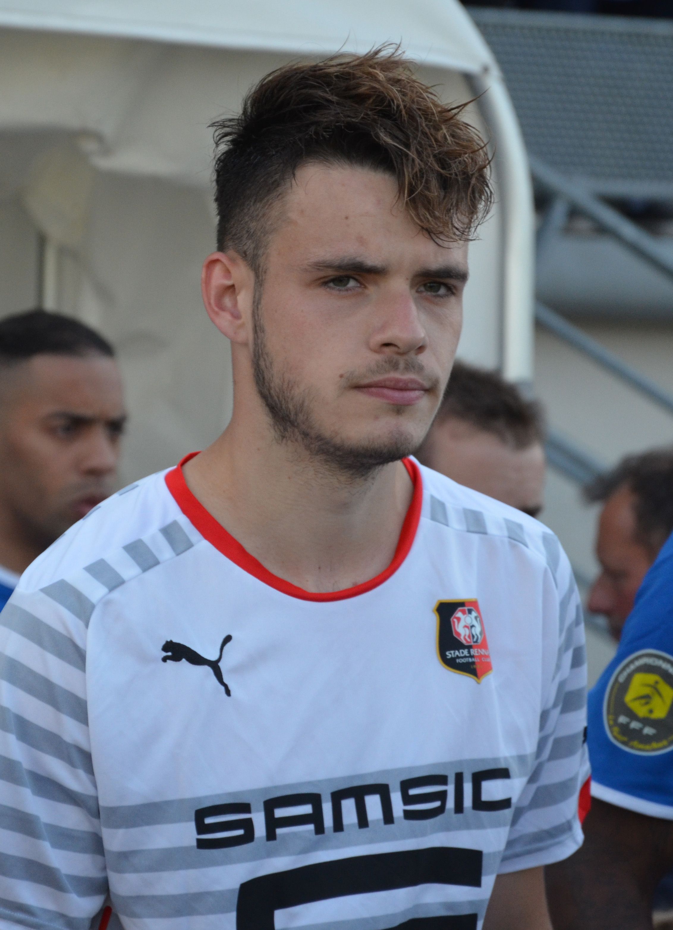 Photographie de Jérémy Gélin lors d'un match de CFA2 opposant le FC Saint-Lô au Stade rennais le 23 mai 2015.